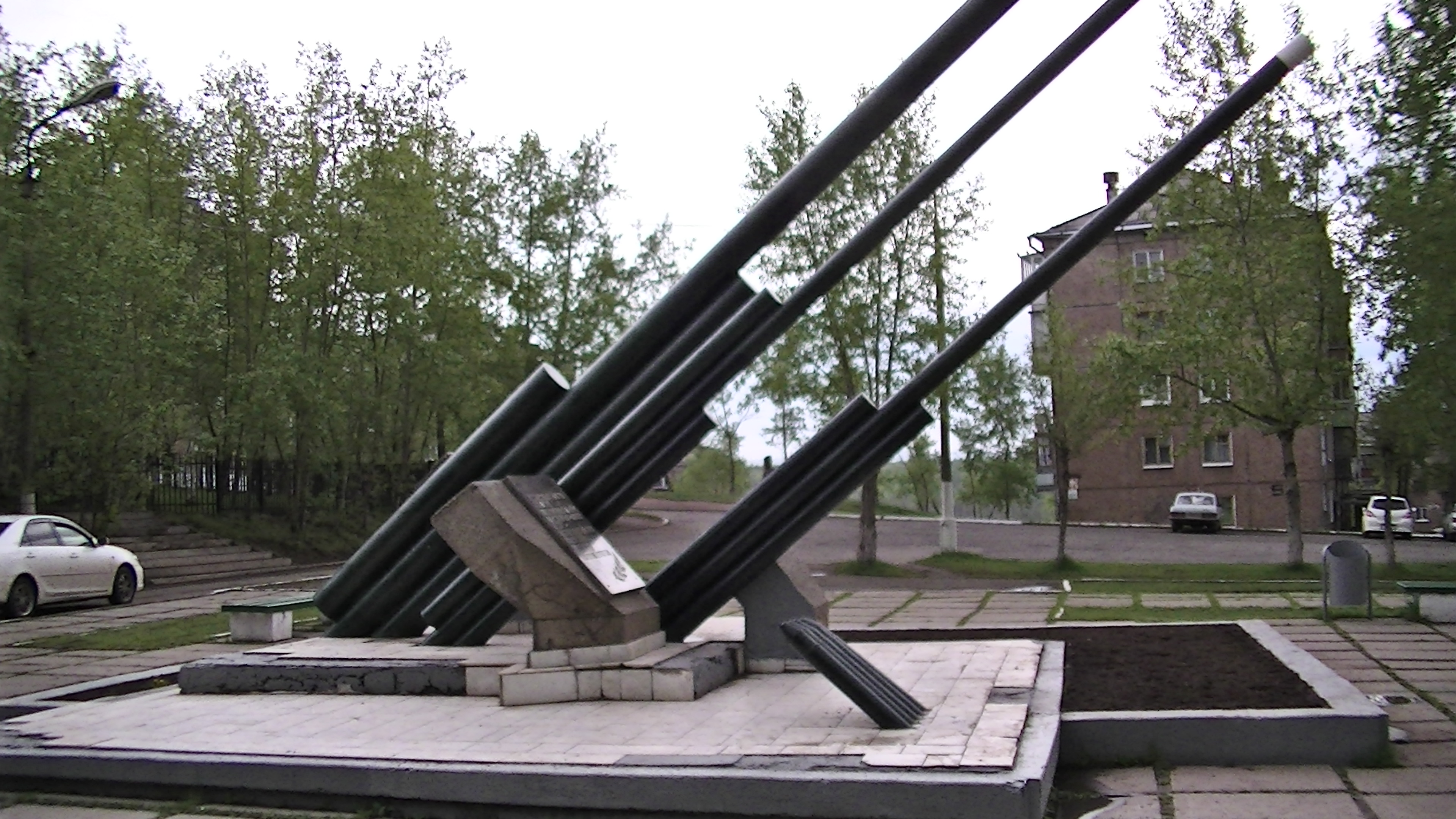 Памятник Герою Советского Союза артиллеристу Михаилу Ивановичу Баркову: между улицами Баркова и Снежной, дом 39, Братск, Иркутская область